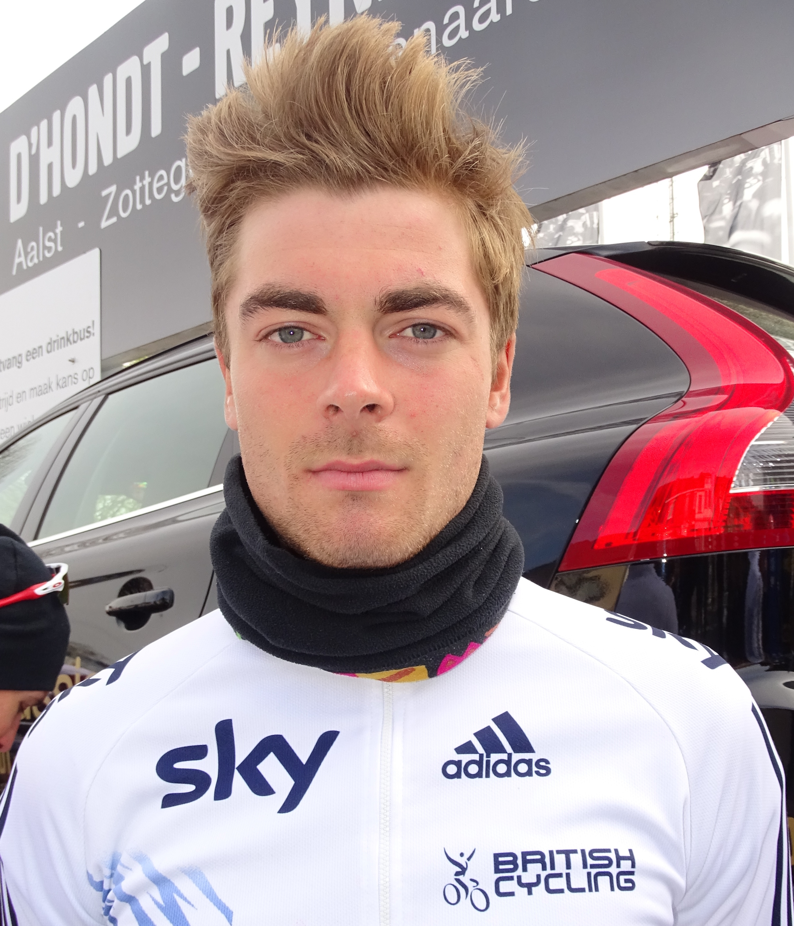 Reportage réalisé le samedi 9 avril à l'occasion du départ et de l'arrivée du Tour des Flandres espoirs 2016 à Audenarde, Belgique.